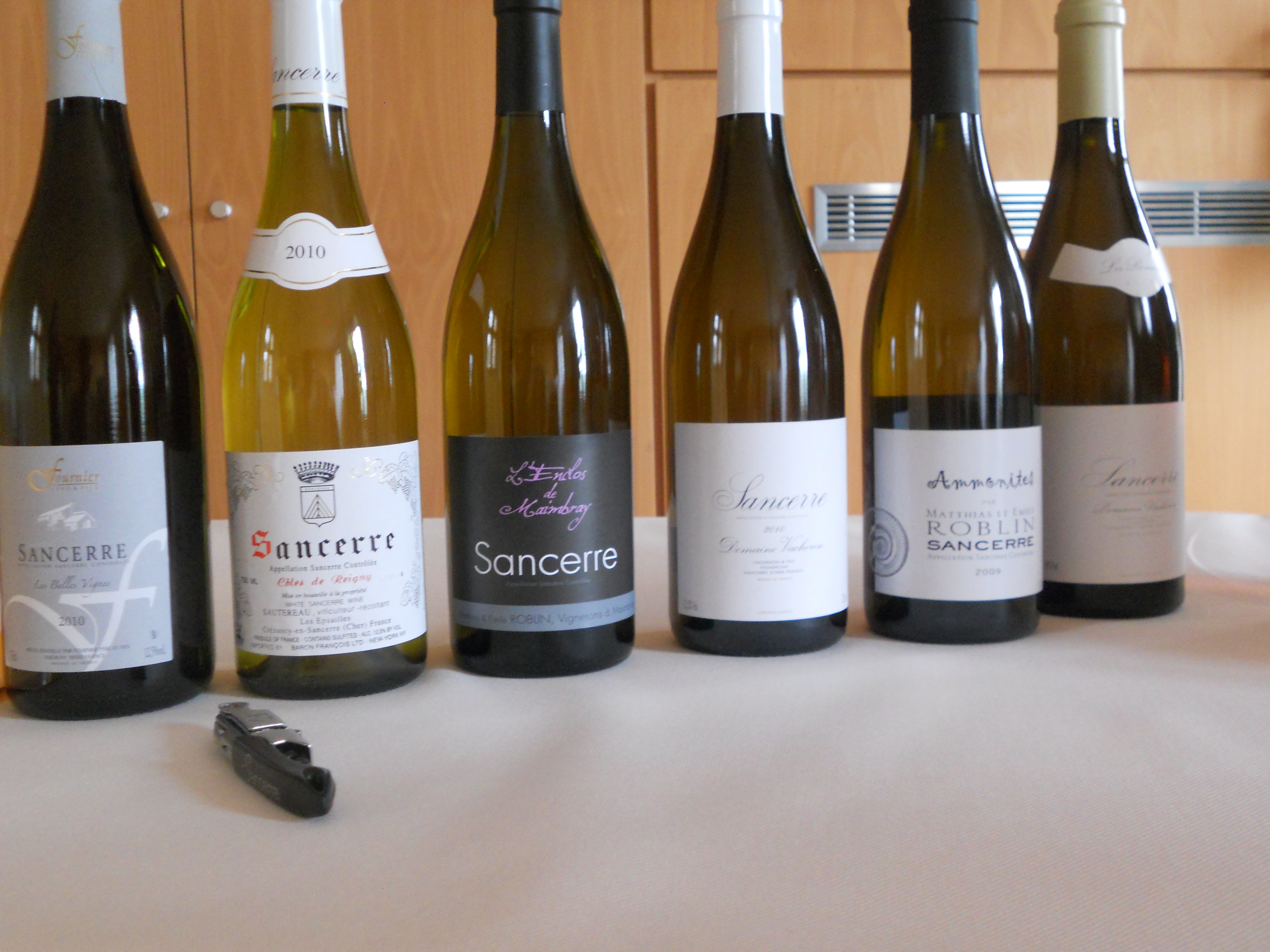 Bouteilles d'AOC sancerre blanc